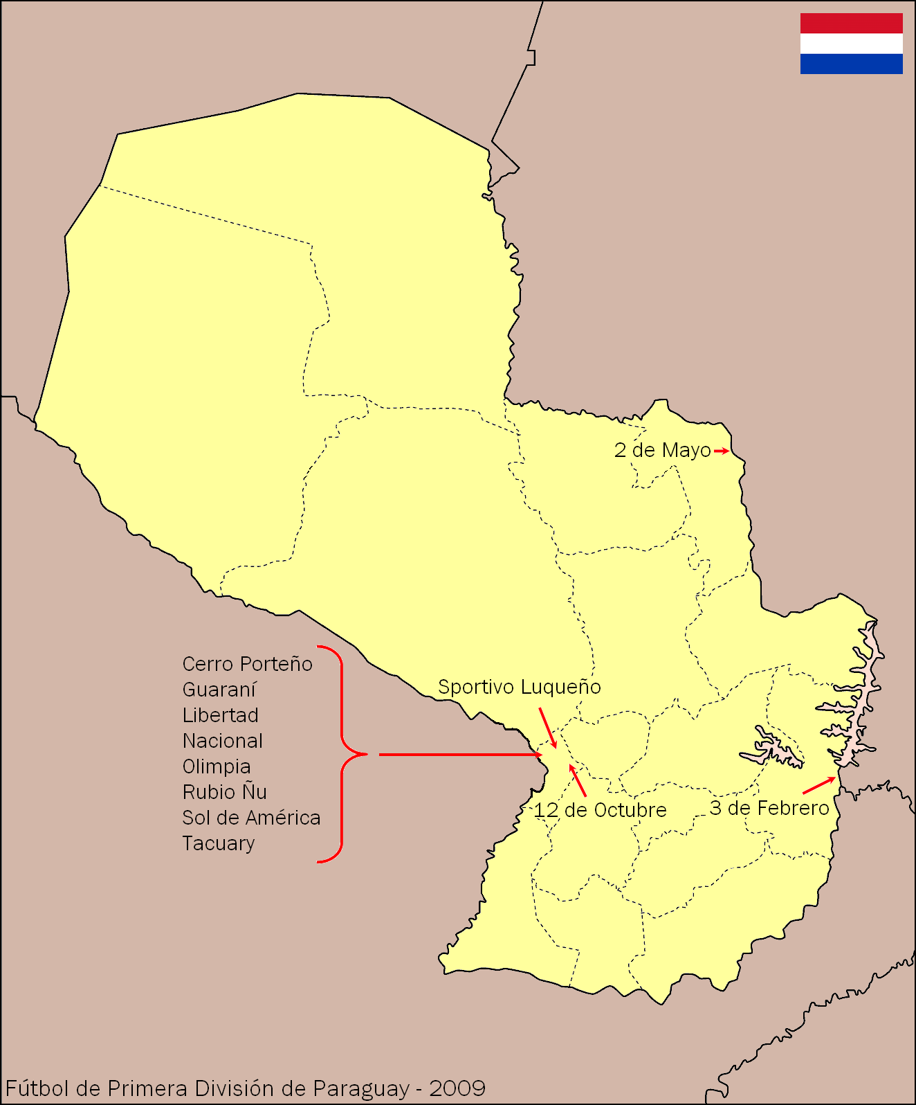 El presente mapa del Paraguay indica las cinco ciudades donde se encuentran ubicadas las sedes de los doce clubes de la Primera División del fútbol profesional paraguayo en la temporada 2009.